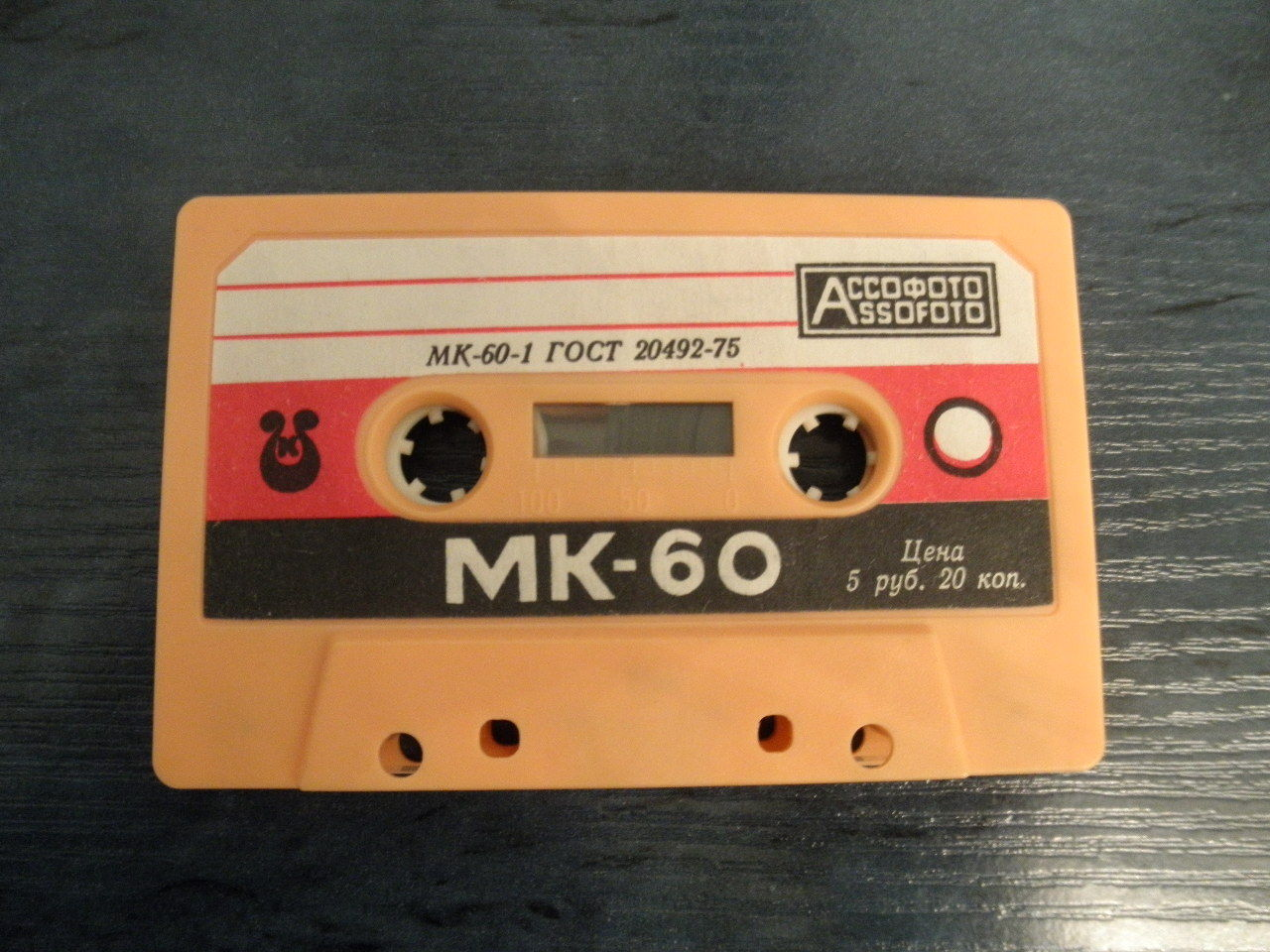 digikassett